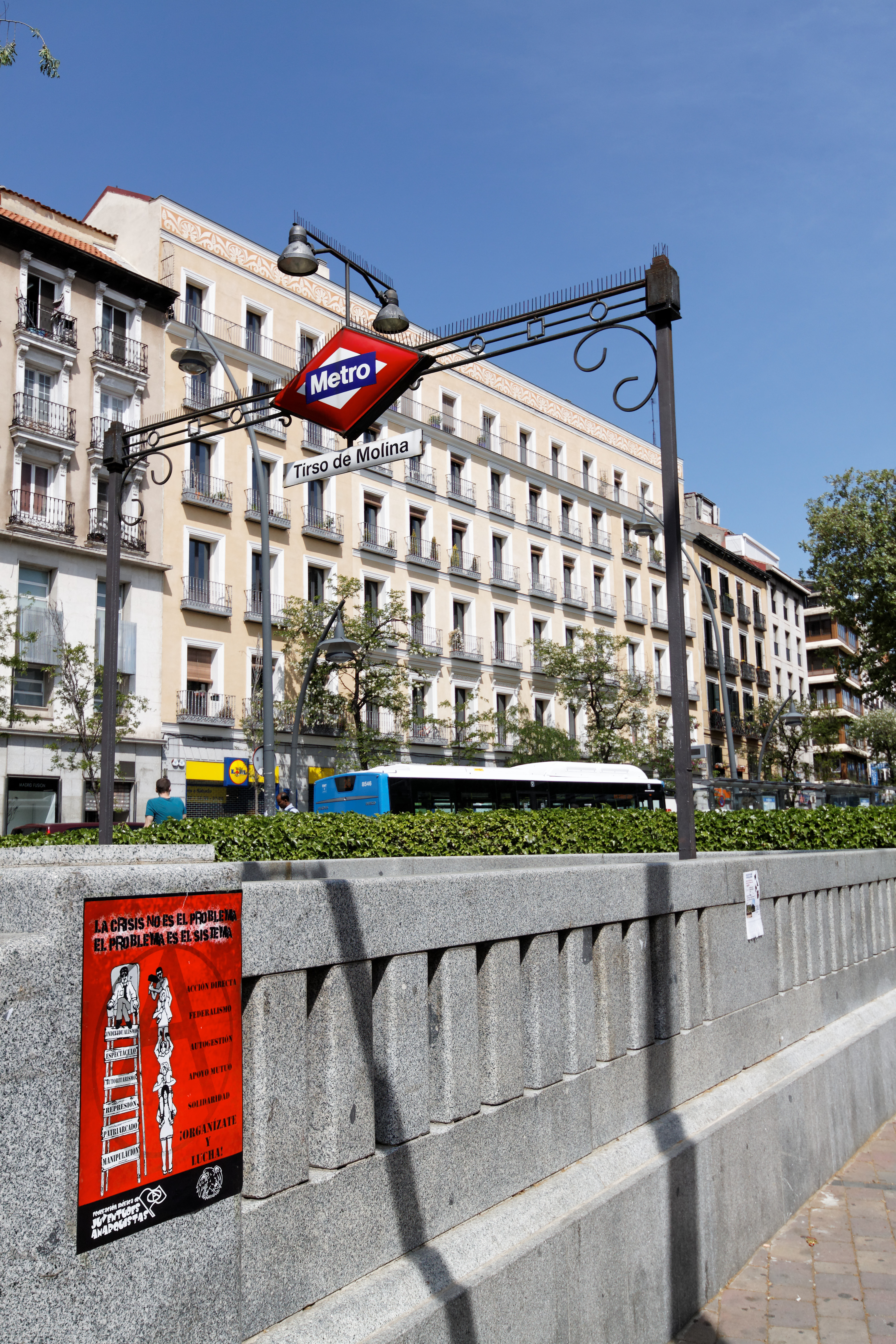 Acceso a la estación de Metro Tirso de Molina, ubicada en la plaza homónima, Madrid.